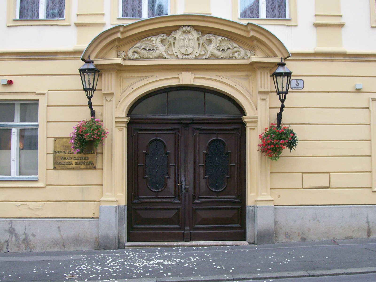 Ulaz u Staru gradsku vijećnicu, Zagreb, Ćirilometodska ulica 5.